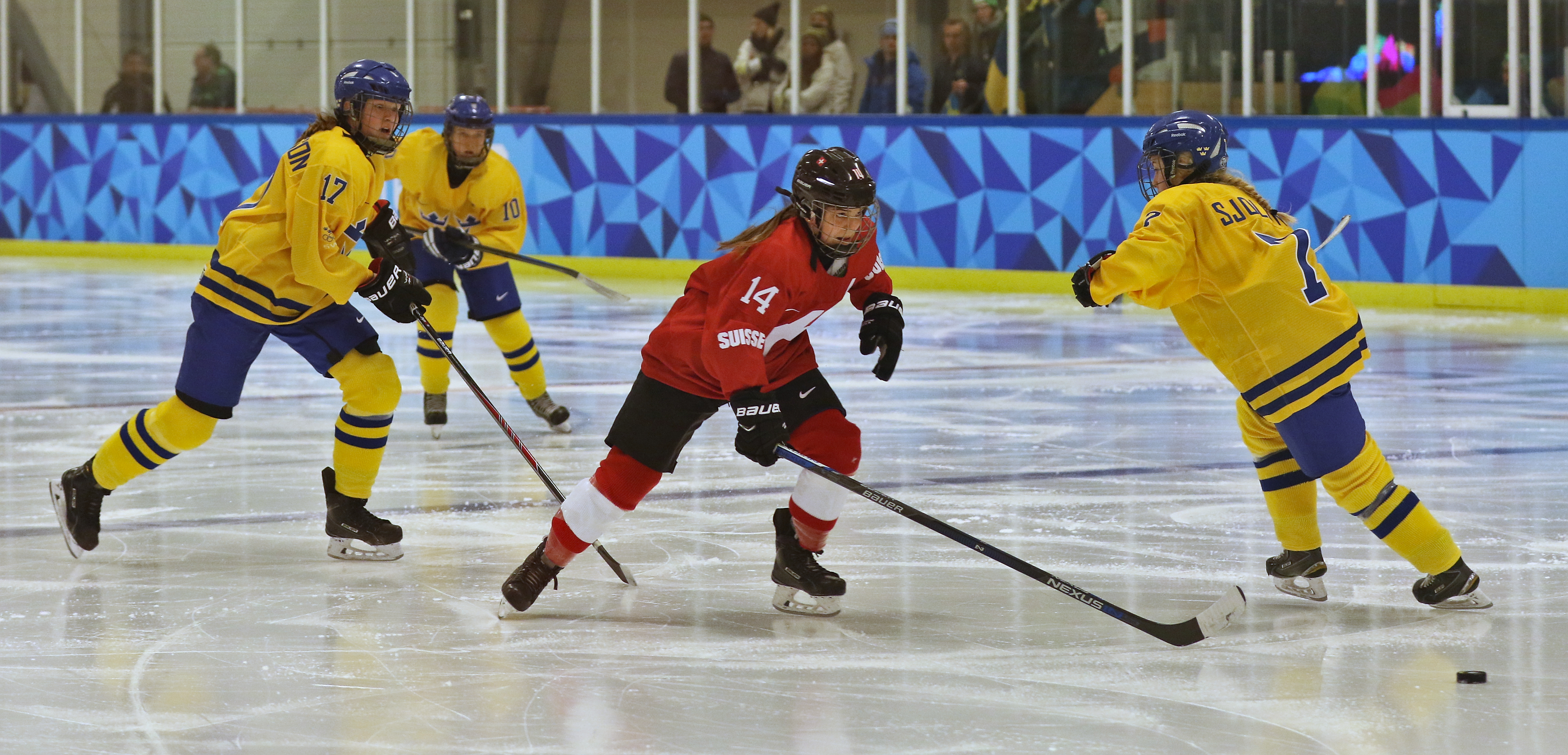 Lillehammer 2016 - Women hockey - Sweden vs Switzerland